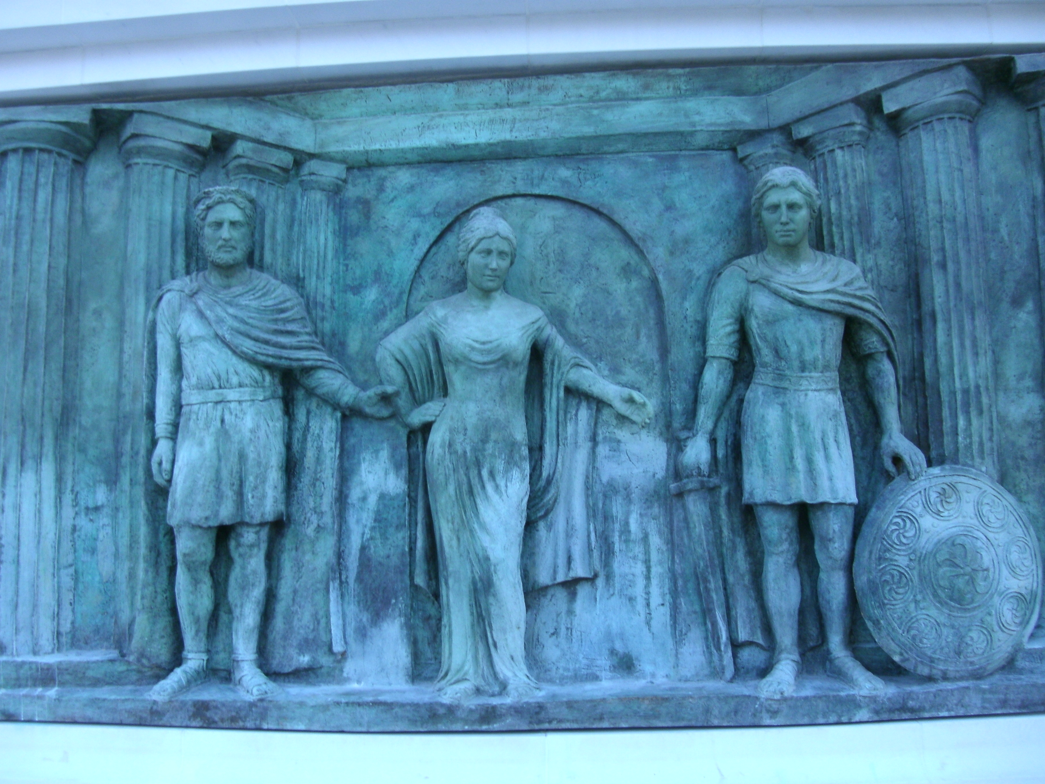 Релјев од споменикот, Филип, Олимпија и Александар bo Автокоманда, Скопје